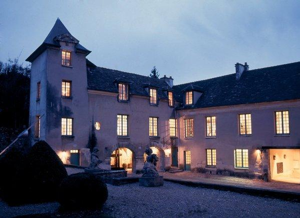 Le musée éclairé au crépuscule